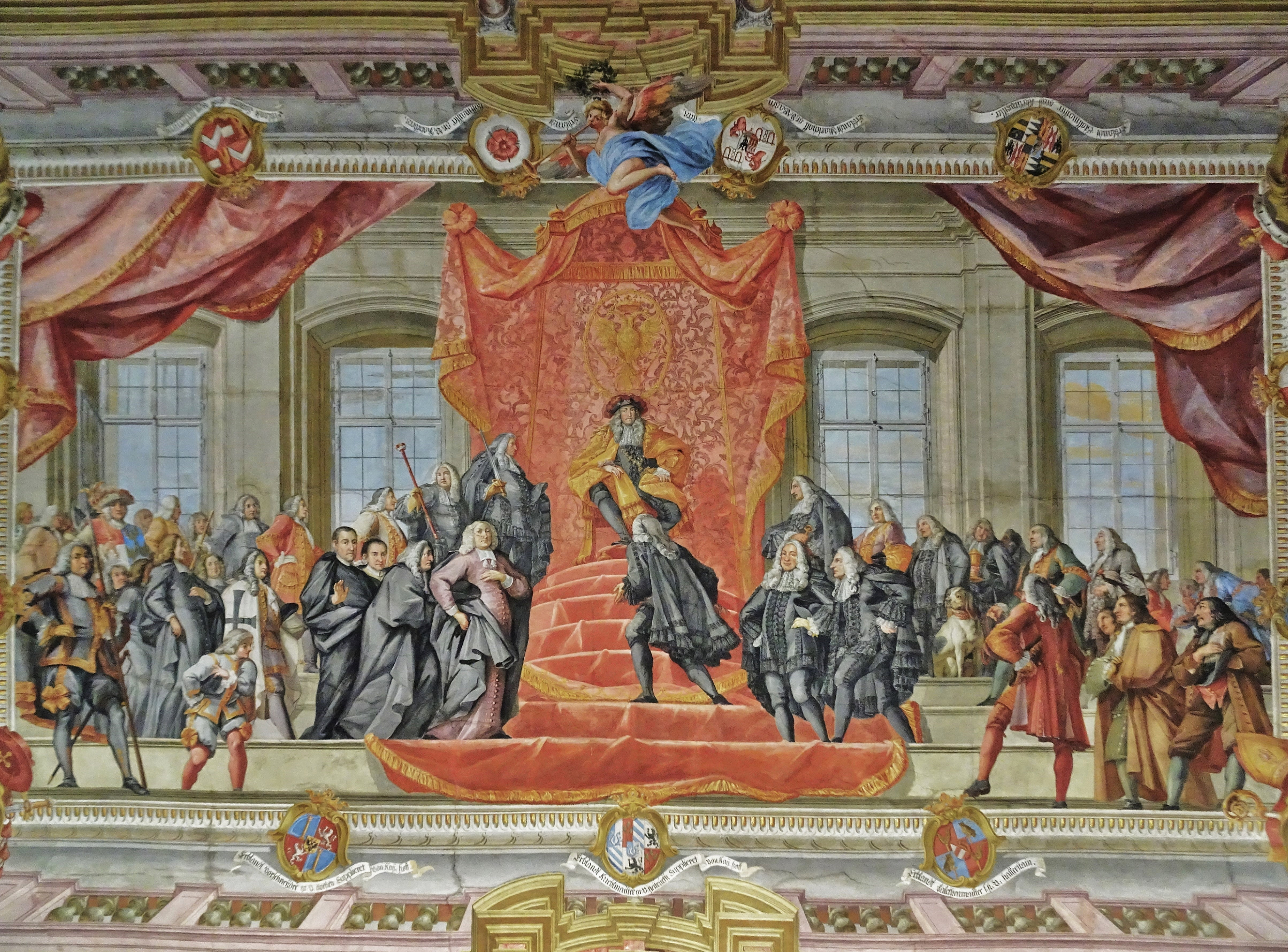 Landhaus Klagenfurt, Deckengemälde von Fromiller im großen Wappensaal